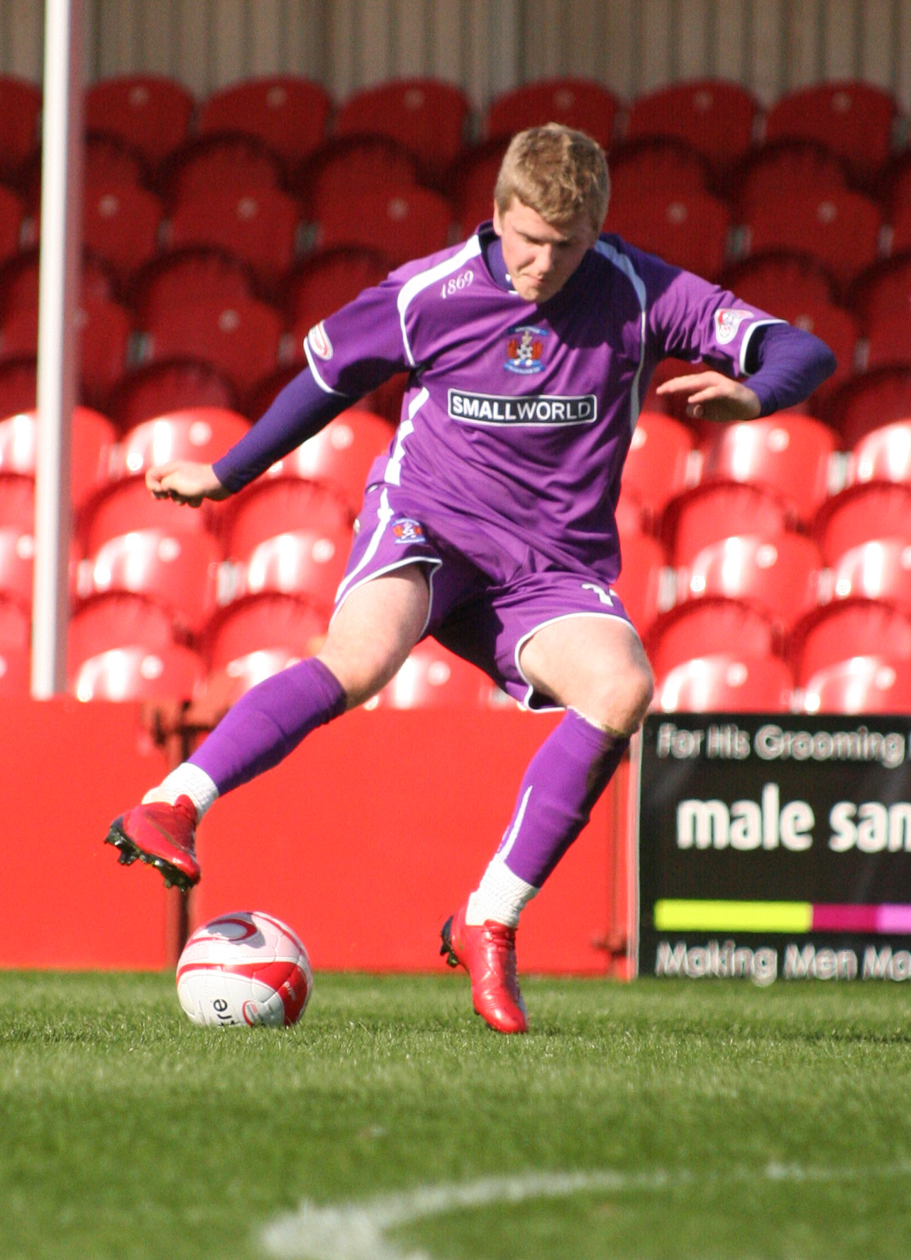 Gibson